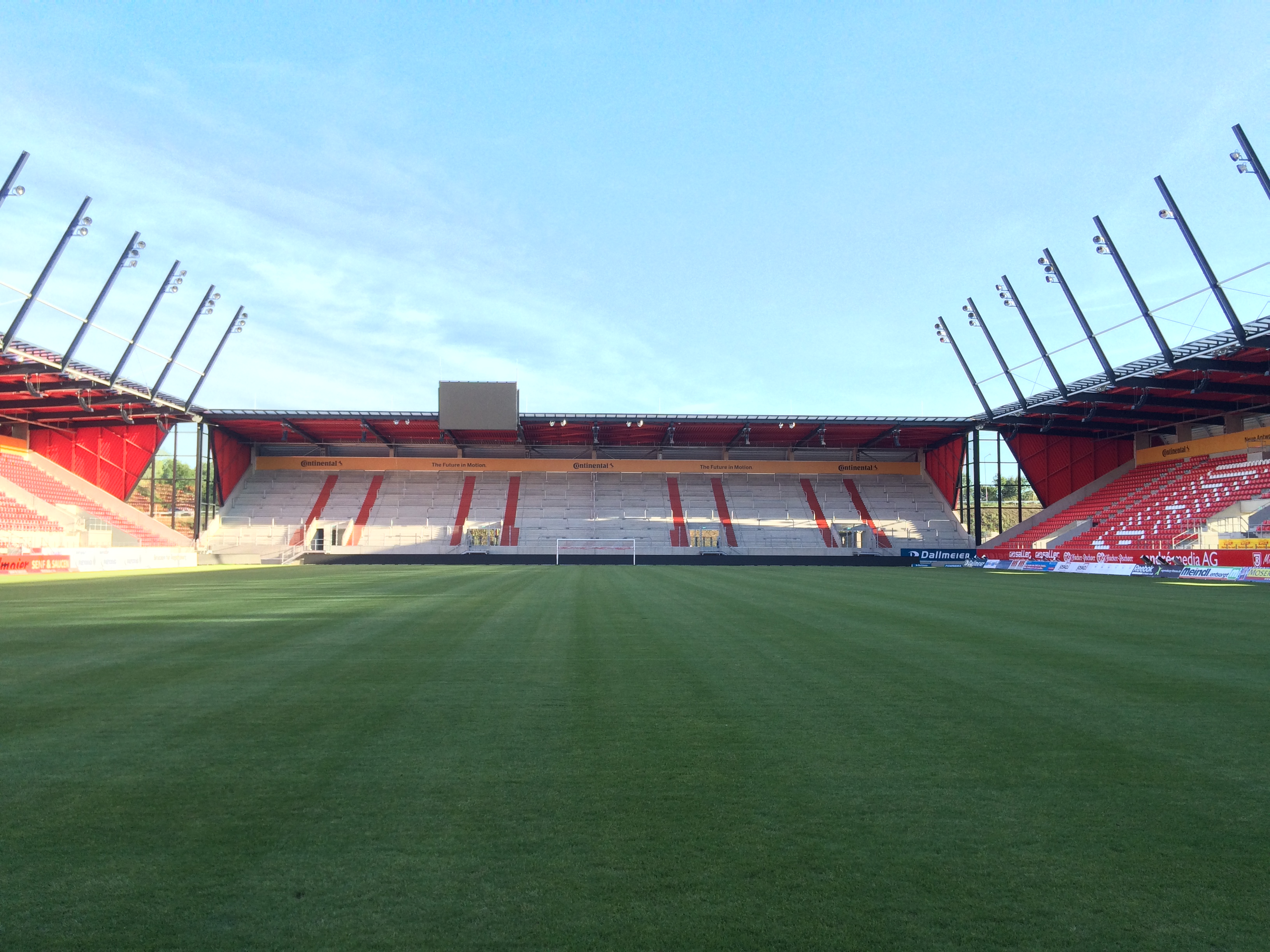 Ansicht der Südtribüne in der Continental Arena, von den Fans Hans Jakob-Tribüne genannt